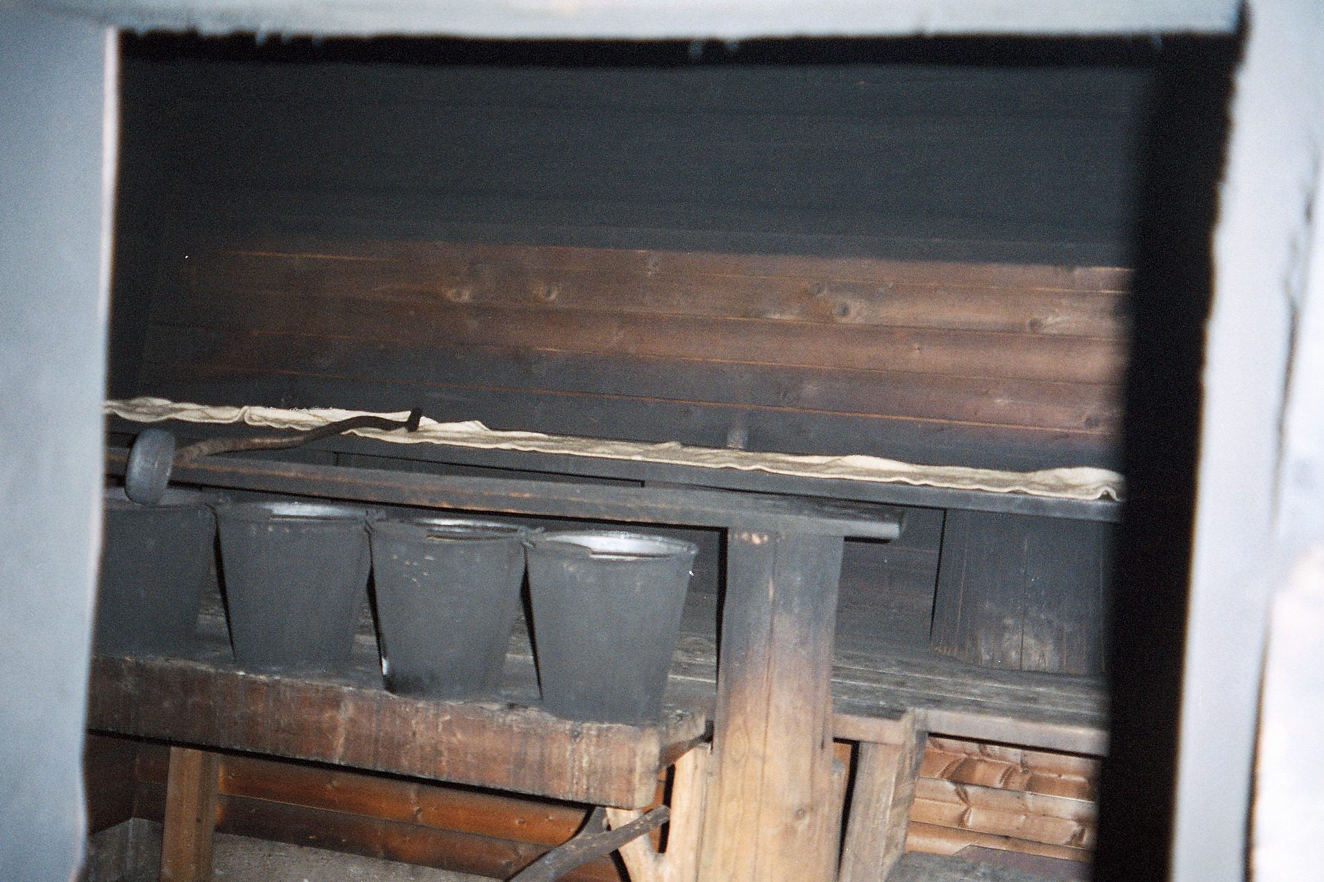 Intérieur d'un sauna collectif à fumée (Pirkanmaa, Finlande)